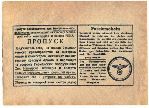 Пропуск-предложение немецких сил к русским перейти на сторону немецкой армии в состав РОА